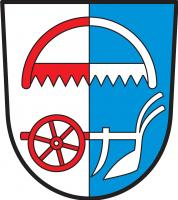 Znak obce Hříšice